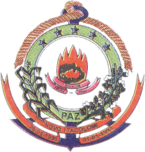 Brasão de Novo Itacilomi